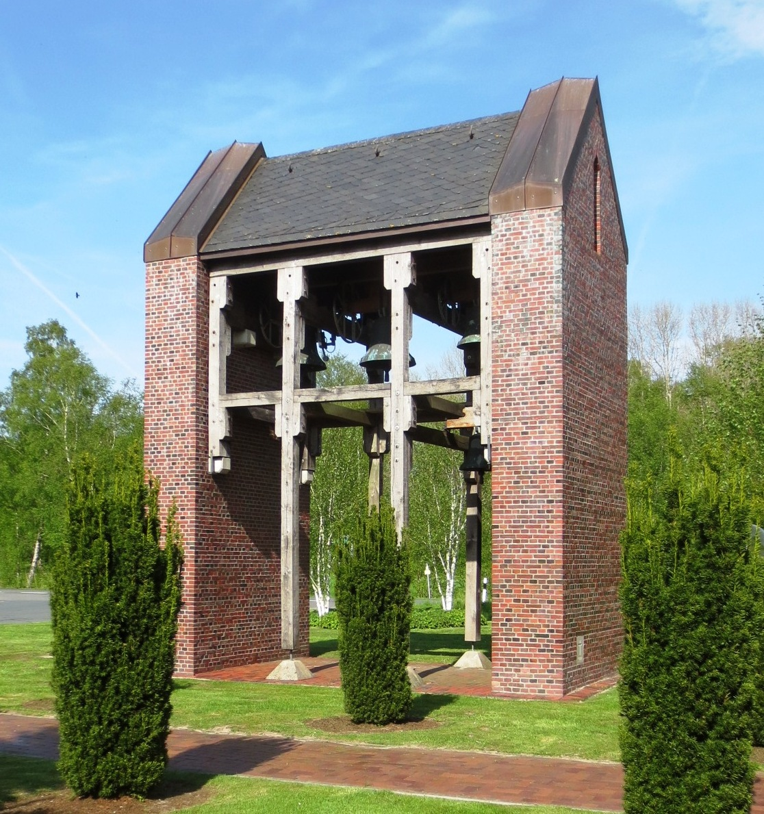 Der Glockenstuhl der Versöhnungskirche Hinrichsfehn im Jahr 2015